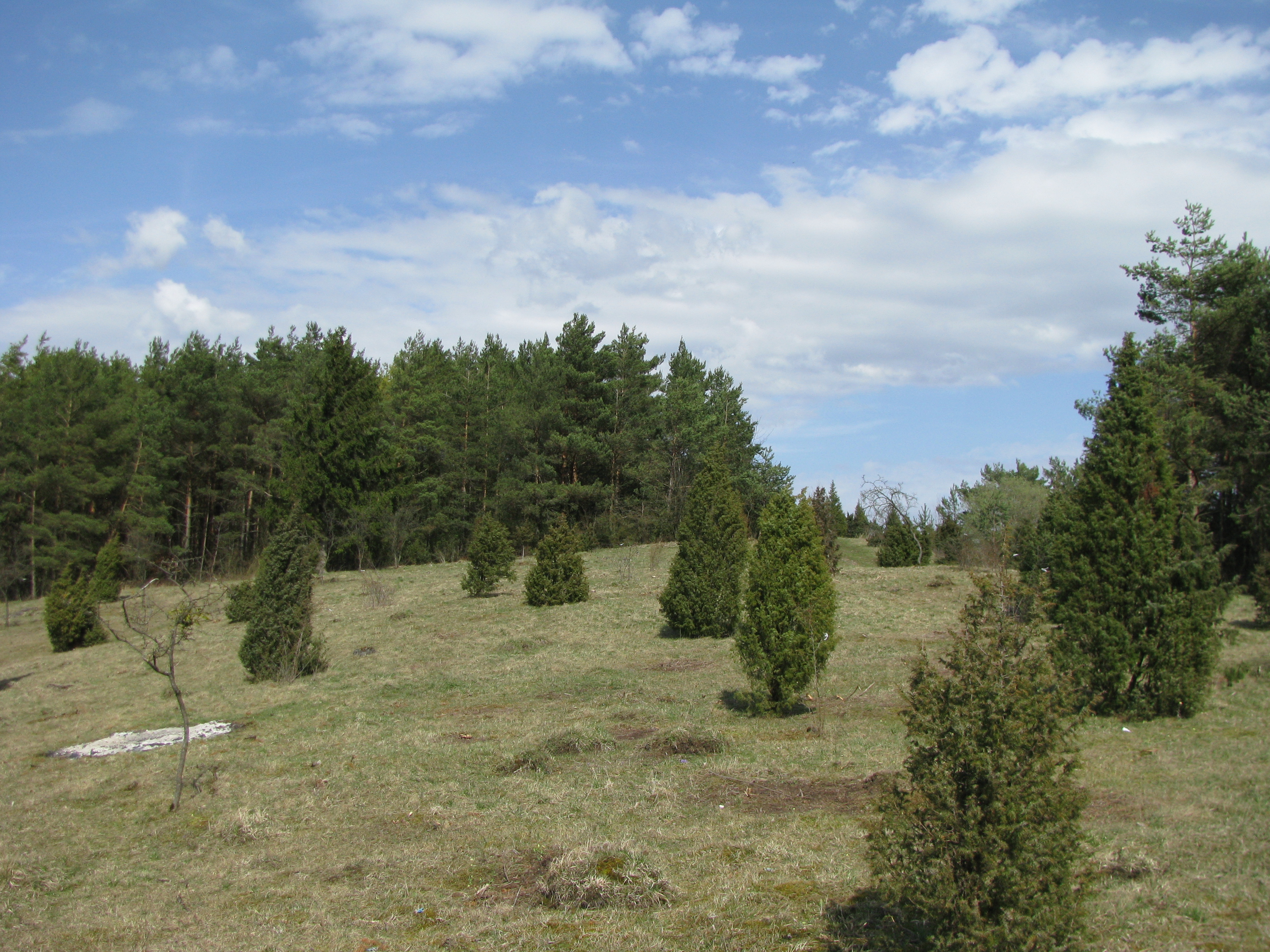 Kalkmagerrasenfläche östlich von Witzenhausen-Roßbach, FFH 4624-302